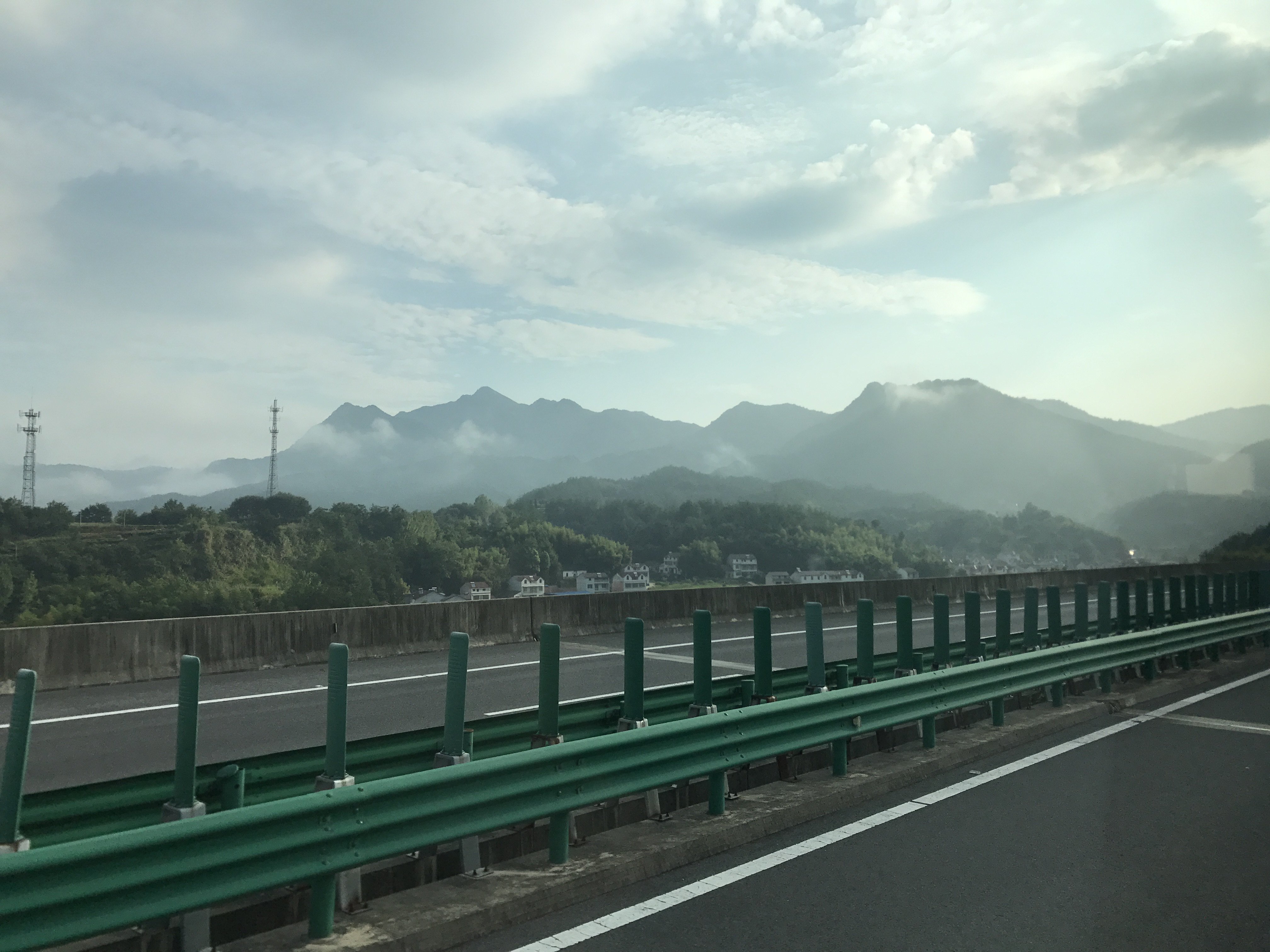 湖北省黄岡市英山県楊柳湾鎮附近